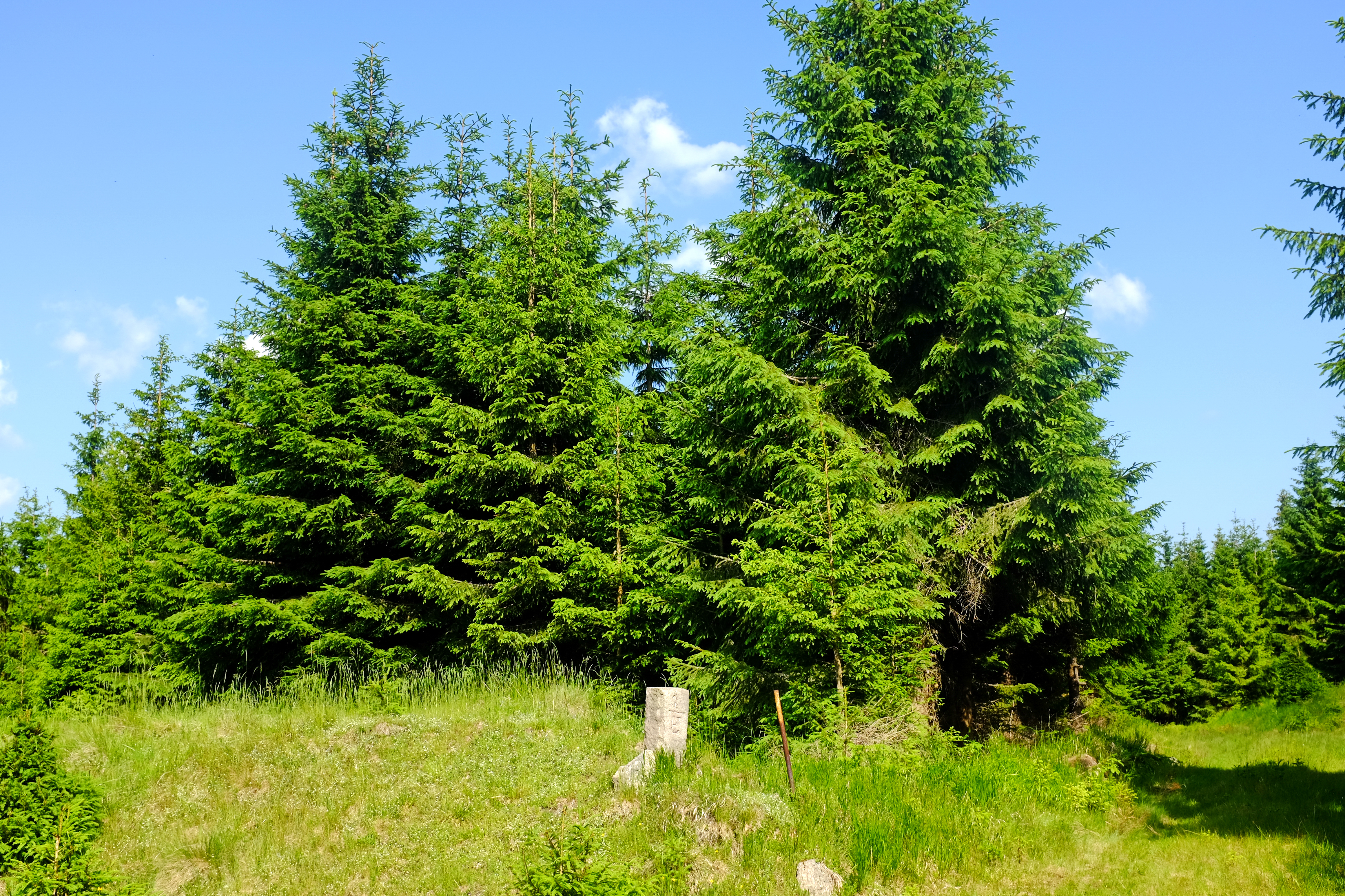 Zaječí vrch (1009 m), vrchol kopce, Krušné hory, okres Karlovy Vary